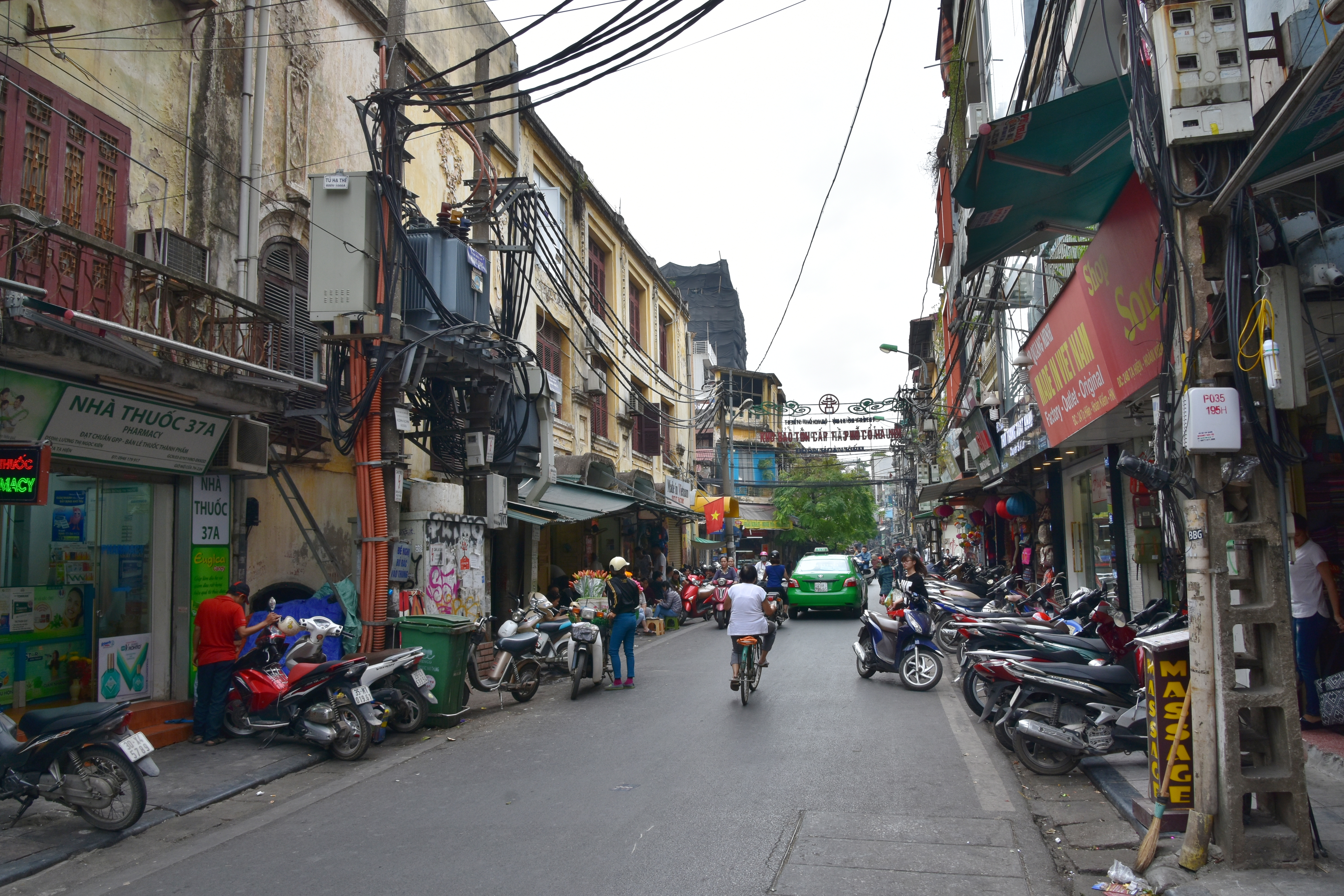 Old Quarter street scene, Hanoi (2)